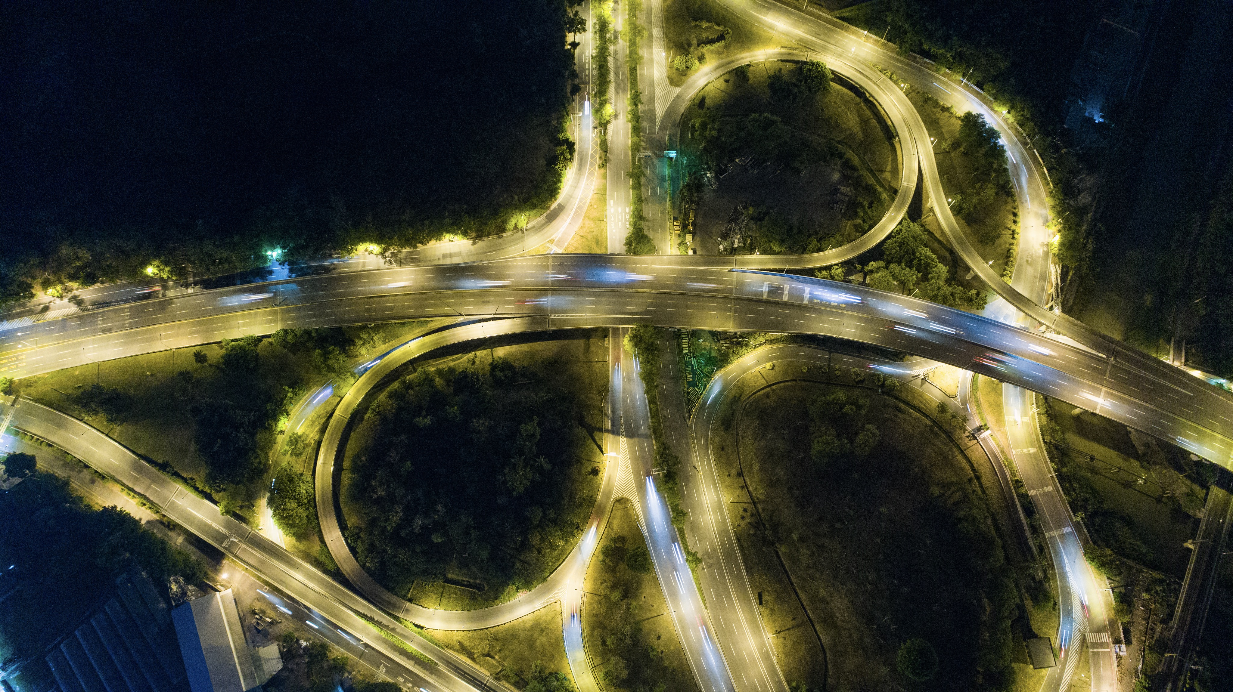 中文（台灣）: 夜間的楠梓陸橋與楠陽高架橋近拍